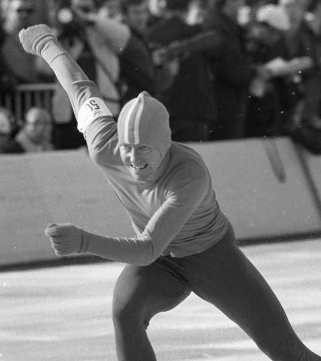 Peter Nottet